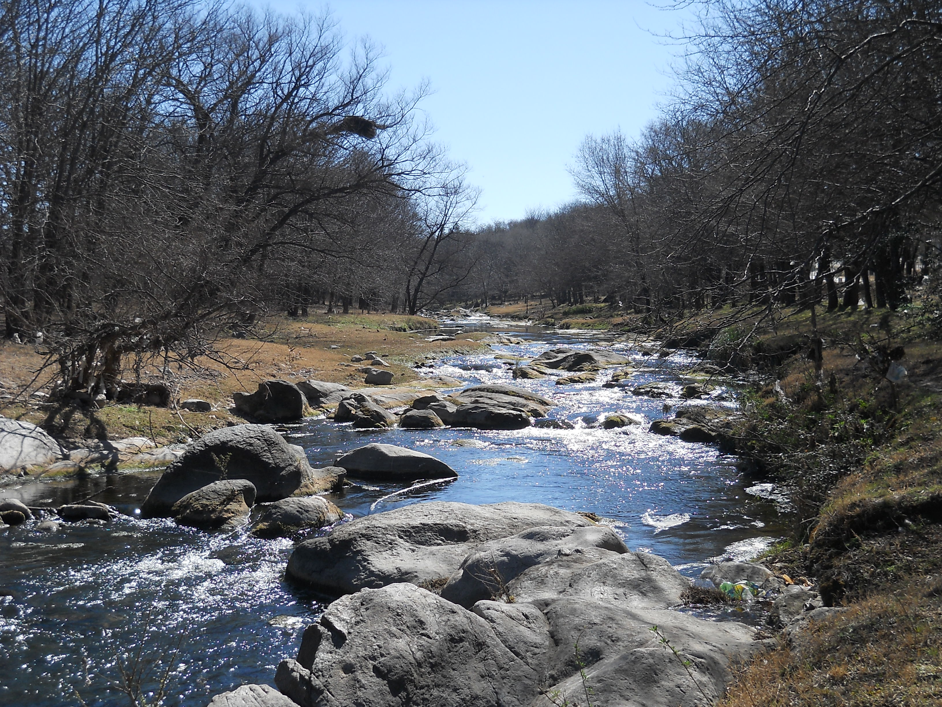 Rio San Francisco en en el ingreso a la Pampa de Oláen